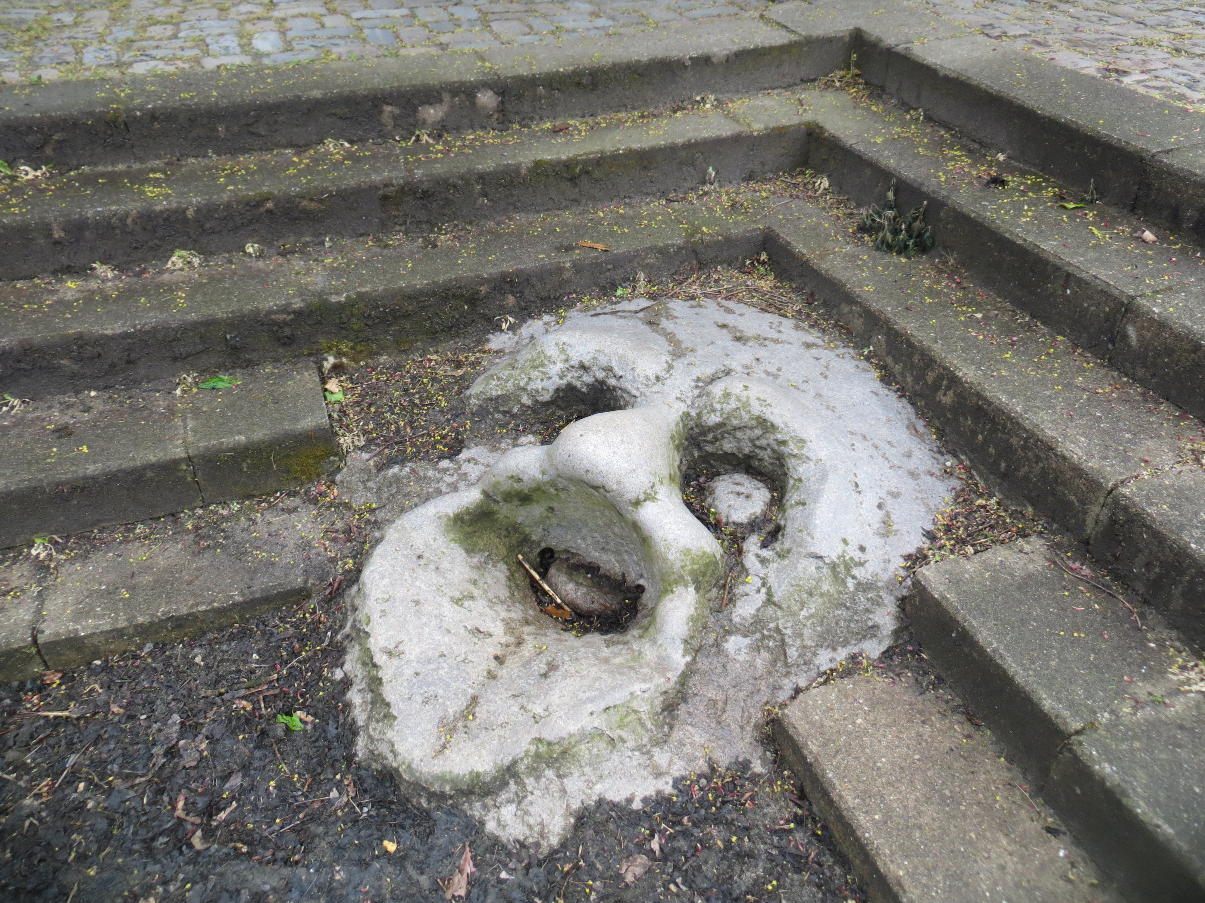 Wasserschlucker der KGS (Flensburg-Adelby), Bild 005